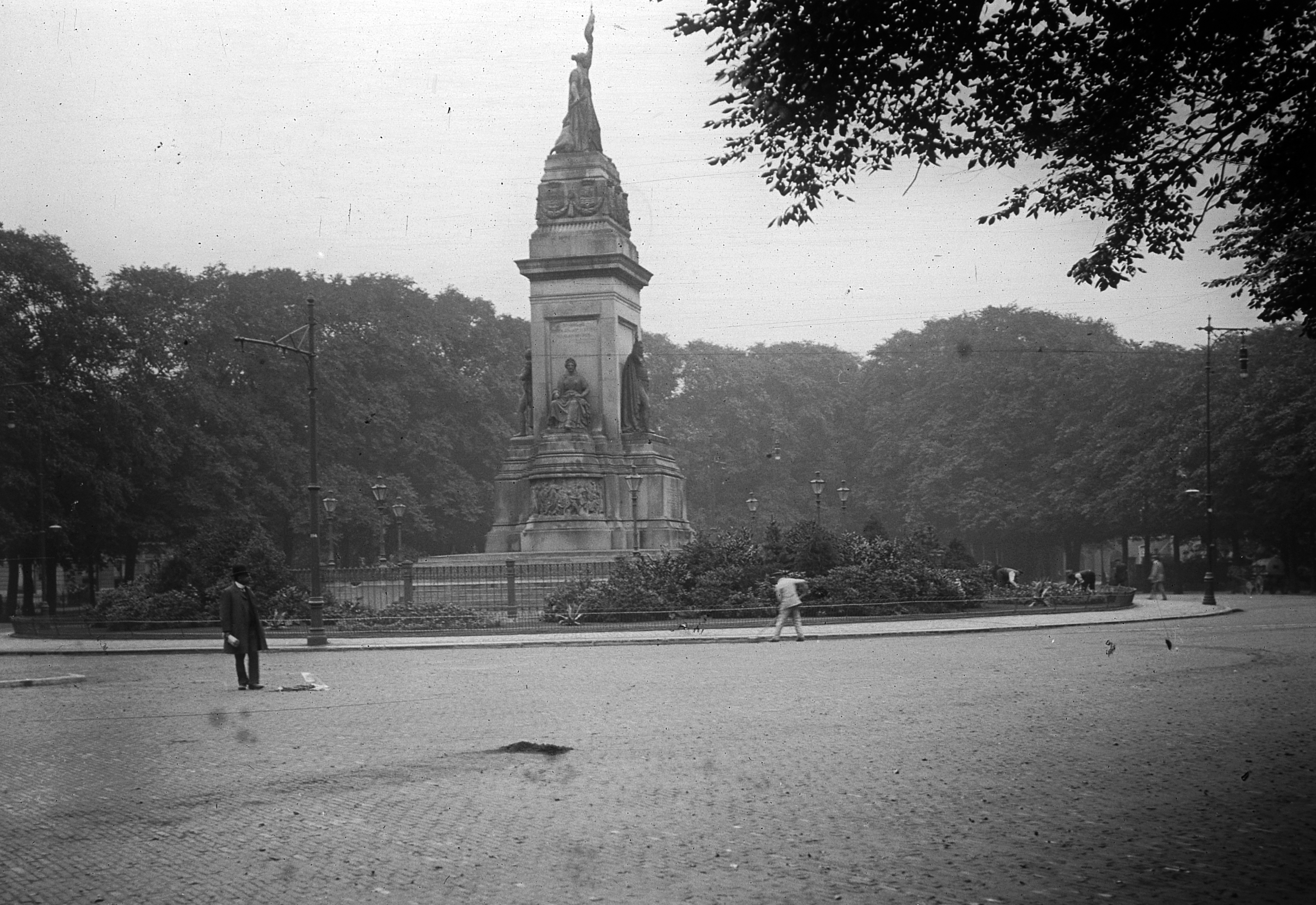 Nemzeti emlékmű a Wilhelmsparkban. Location: Netherlands, Den Haag Tags: monument, sculpture Title: Nemzeti emlékmű a Wilhelmsparkban.